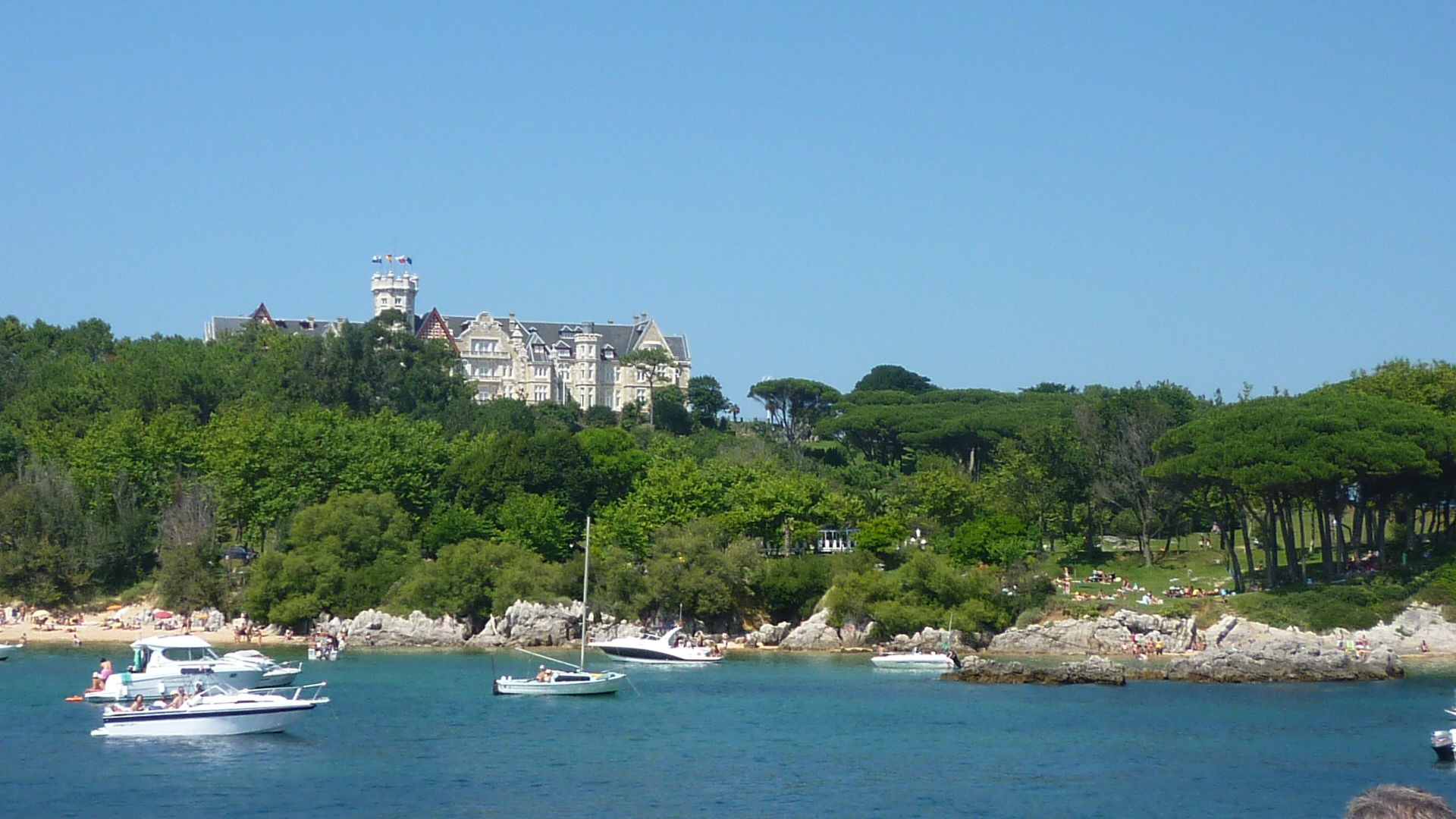 Palacio de la Magdalena desde la Bahia de Santander